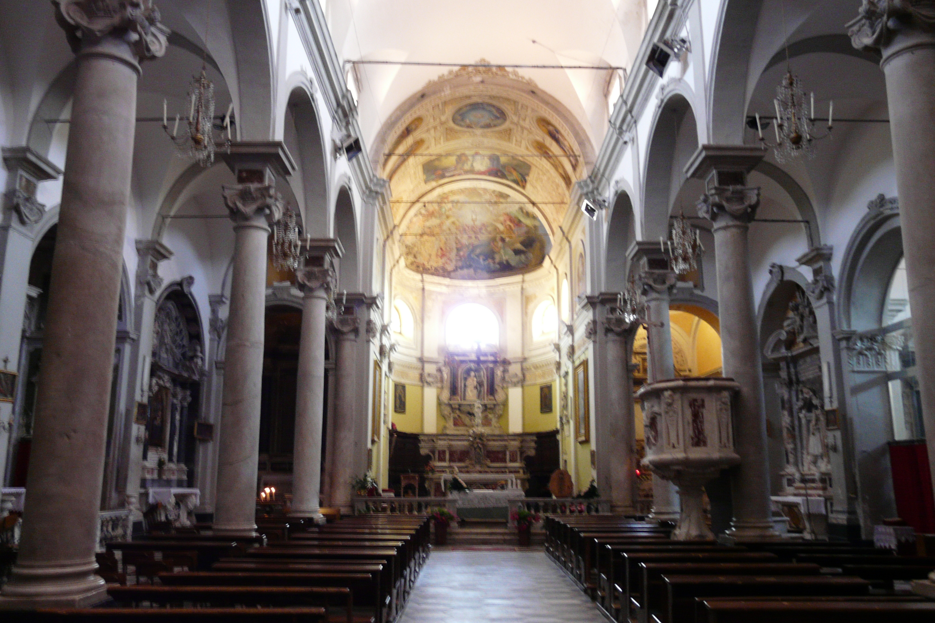 Chiesa di Santa Maria Maddalena, Castelnuovo Magra, Liguria, Italia